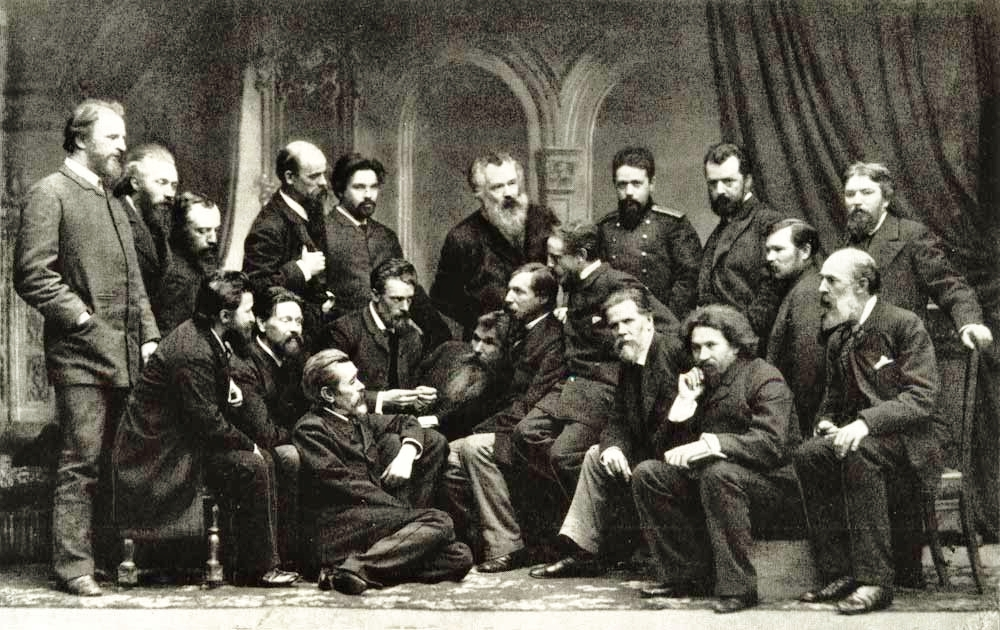 seating from left to right: Sergei Nikolajewitsch Ammosow; Aleksandr Aleksandrowitsch Kisselew; Nikolai Wassilijewitsch Newrew; Wladimir Jegorowitsch Makowski; Aleksandr Dmitrijewitsch Litowschenko; Illarion Michailowitsch Prjanischnikow; Kirill Wikentjewitsch Lemoh; Iwan Nikolajewitsch Kramskoi; Ilja Jefimowitsch Repin; Iwanow (dient im Vorstand der Genossenschaft); Konstantin Jegorowitsch Makowski standing from left to right: Grigorij Grigorjewitsch Mjassojedow; Konstantin Apollonowitsch Sawizki; Wassili Dmitrijewitsch Polenow; Jefim Jefimowitsch Wolkow; Wassili Iwanowitsch Surikow; Iwan Iwanowitsch Schischkin; Nikolai Alexandrowitsch Jaroschenko; Pawel Alexandrowitsch Brjullow; Alexandr Karlowitsch Beggrow.